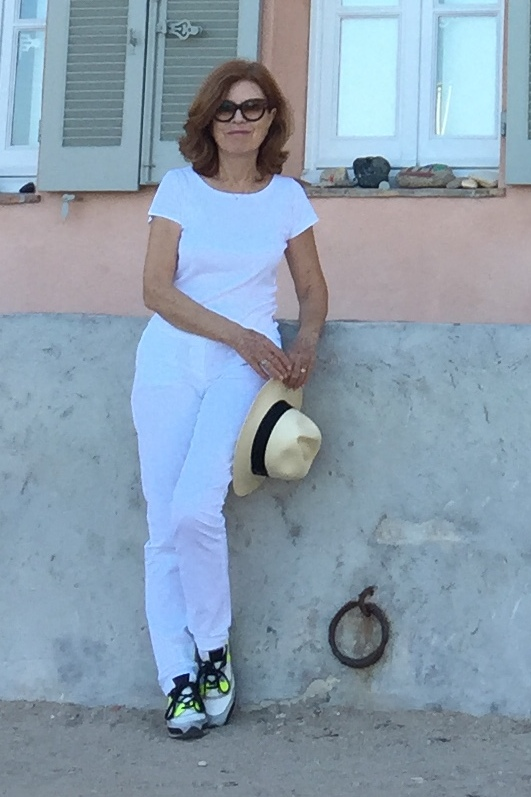 Caroline HUPPERT. Saint-Tropez